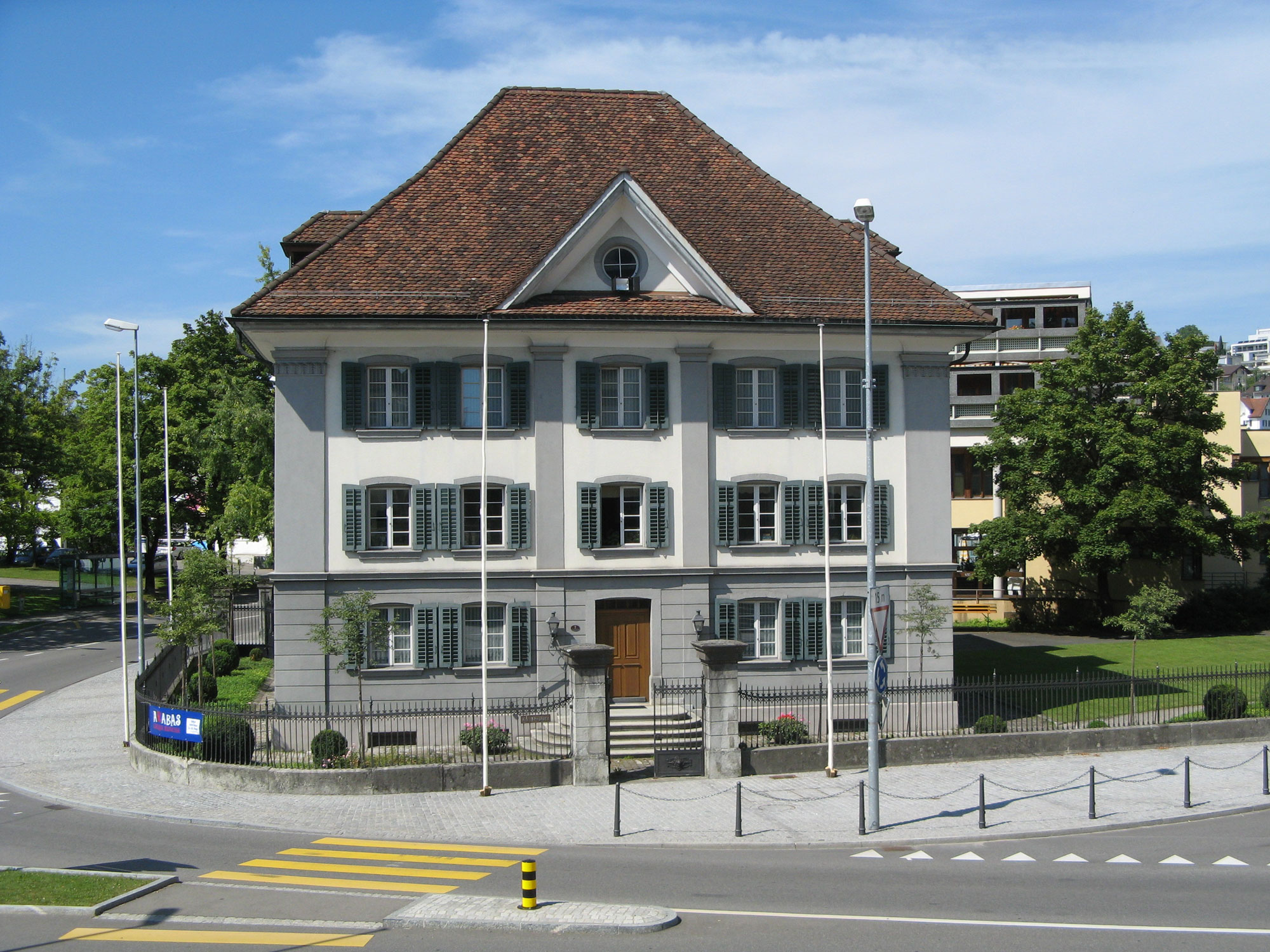 Emmanuel-Isler-Haus in Wohlen, erbaut 1819